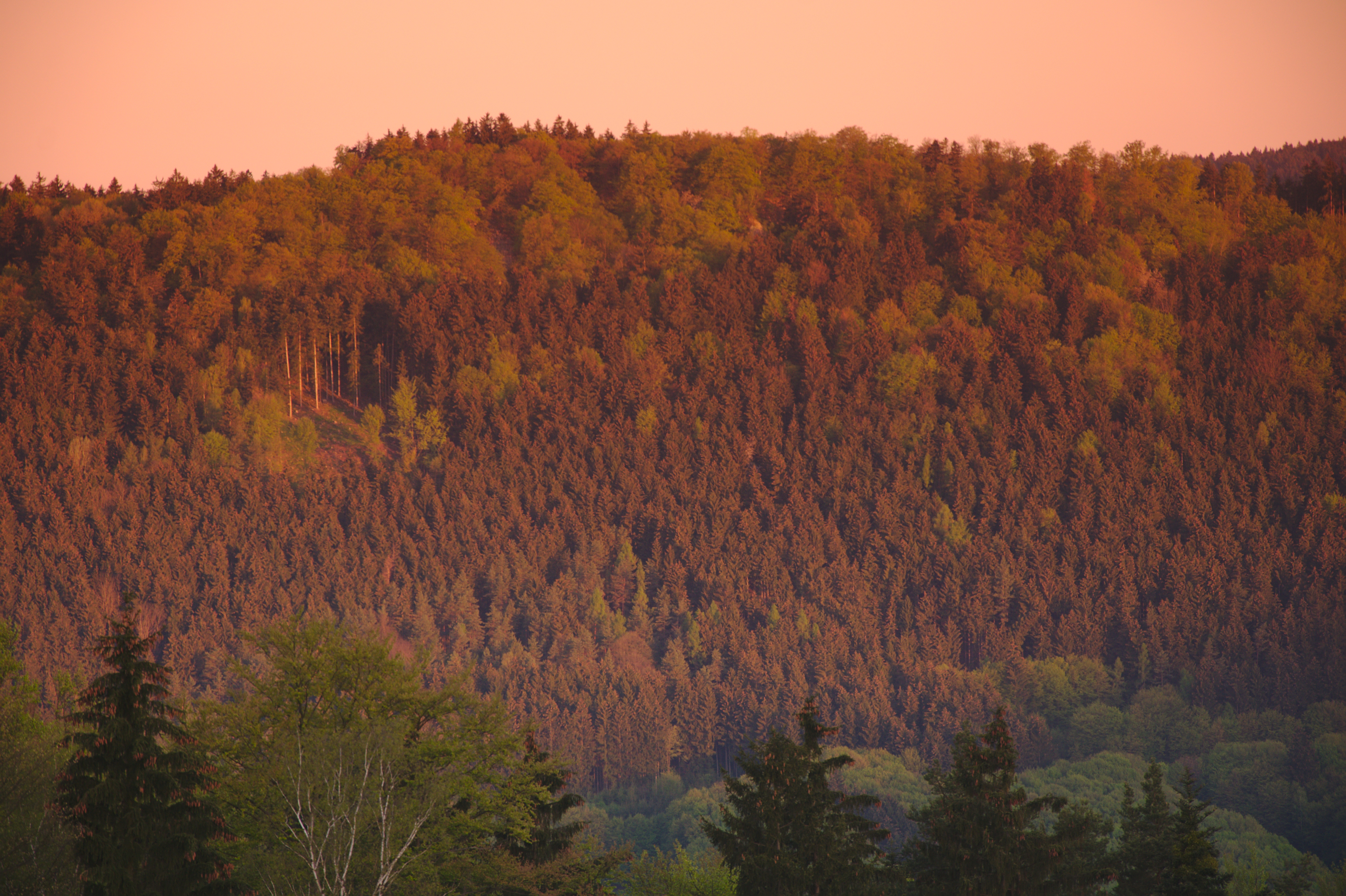 Přírodní rezervace Ochoza z Kopicova vrchu, okres Žďár nad Sázavou